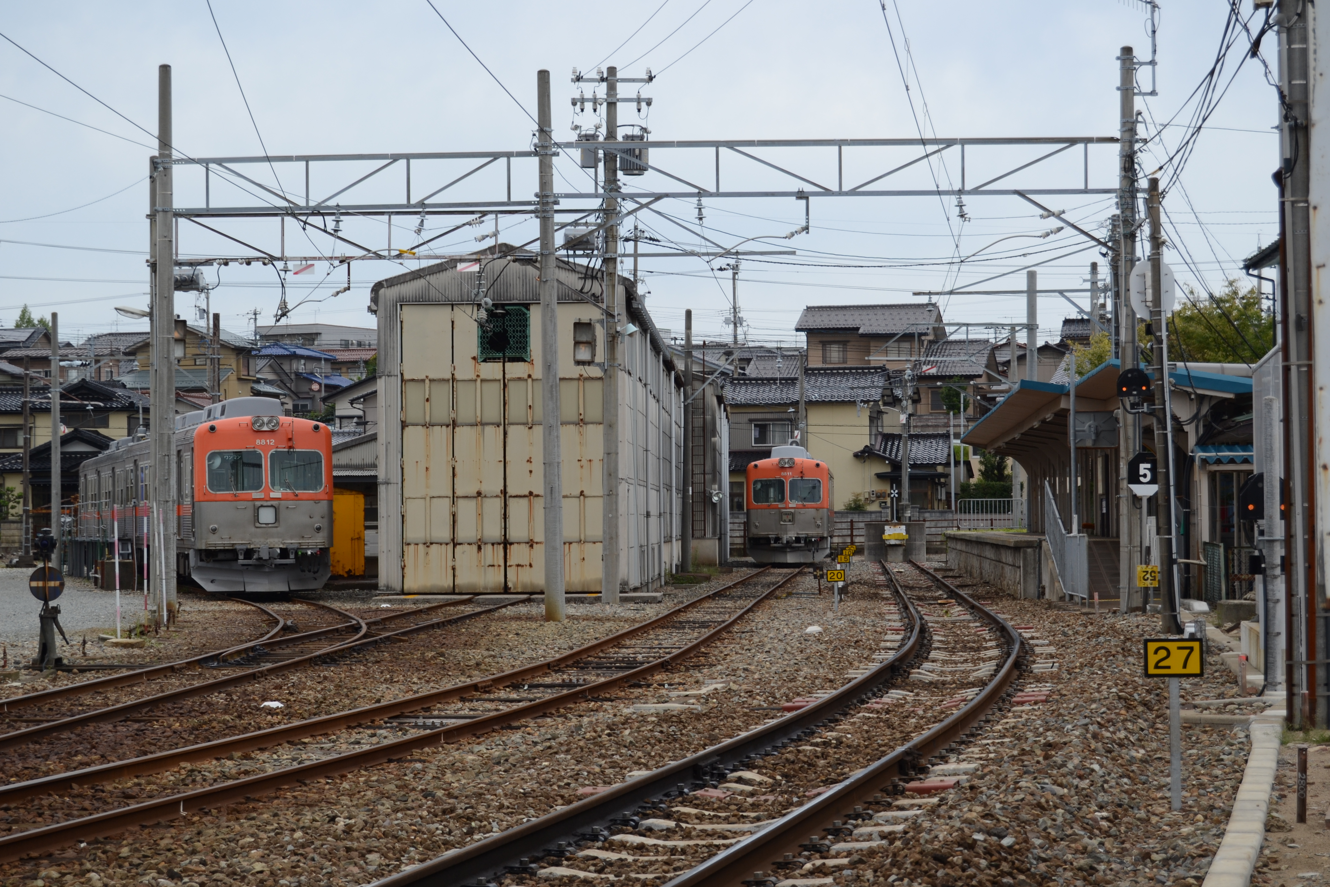 北陸鉄道浅野川線、内灘駅の構内（公道から撮影）